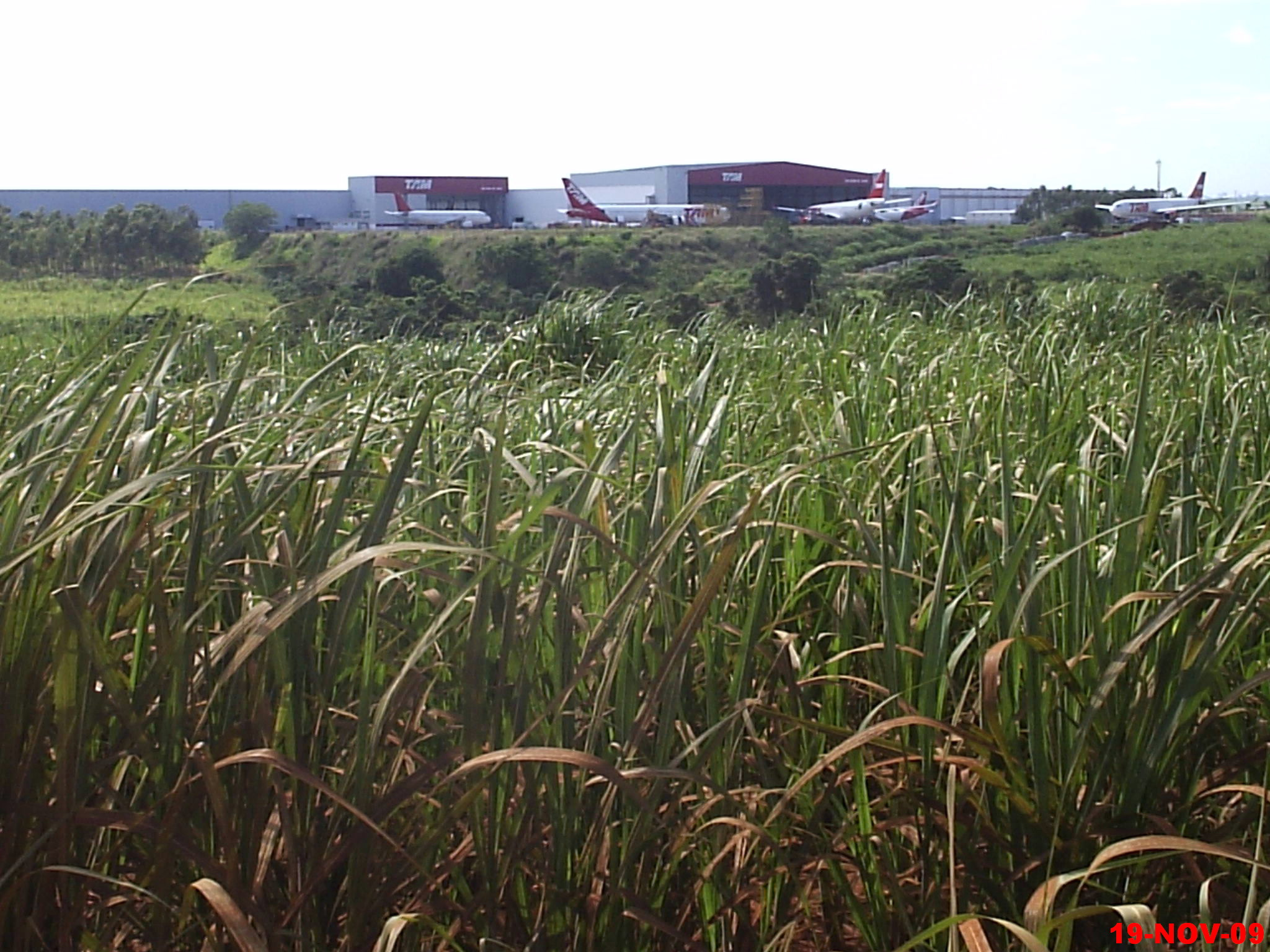 Vista do Centro Tecnológico TAM (Revisão e Manutenção de Aeronaves) - São Carlos